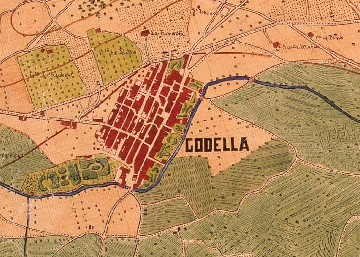 Godella el 1883 (el nord està a la dreta).